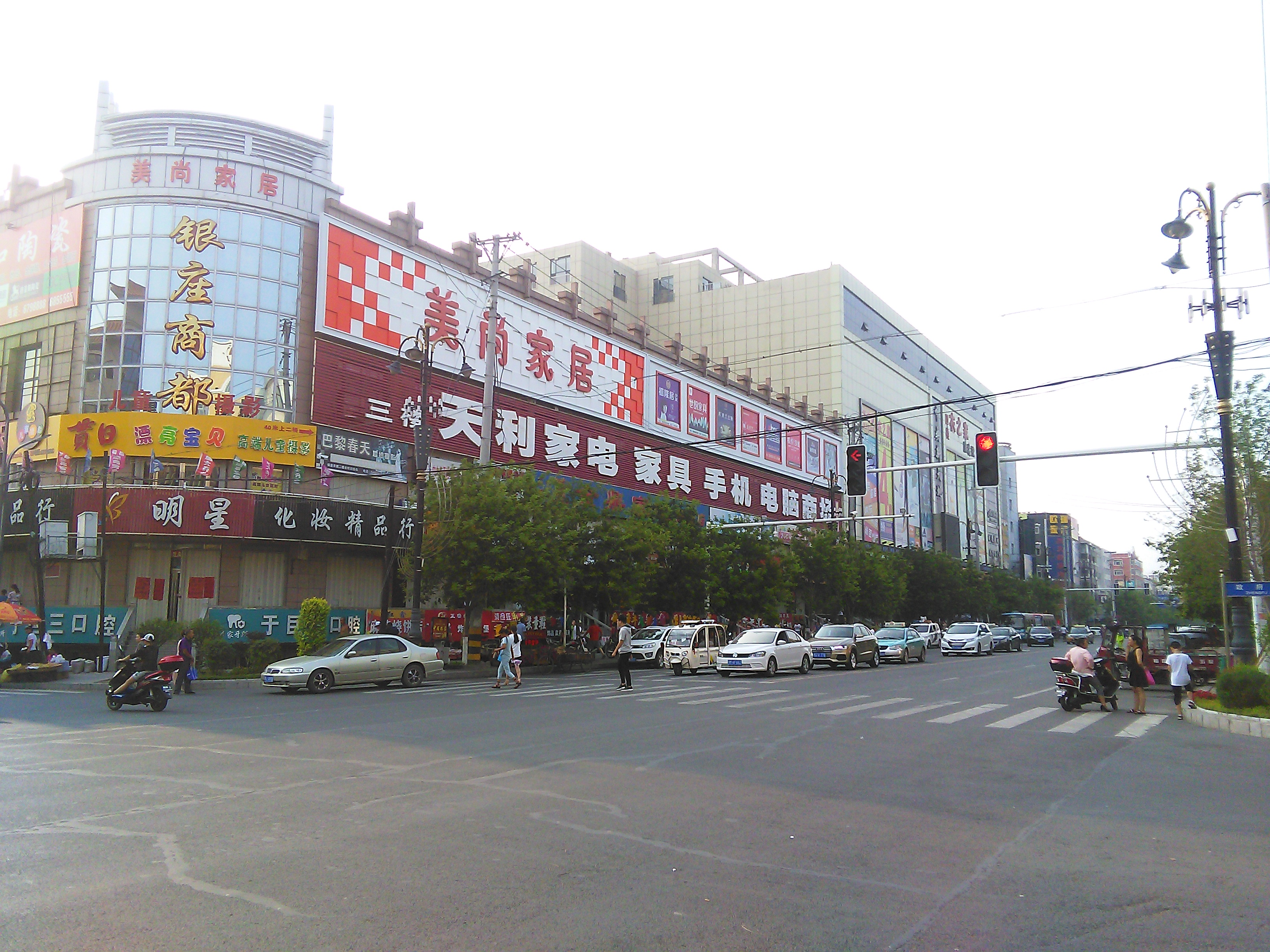 中文（中国大陆）: 奋进路，与政府路交汇点